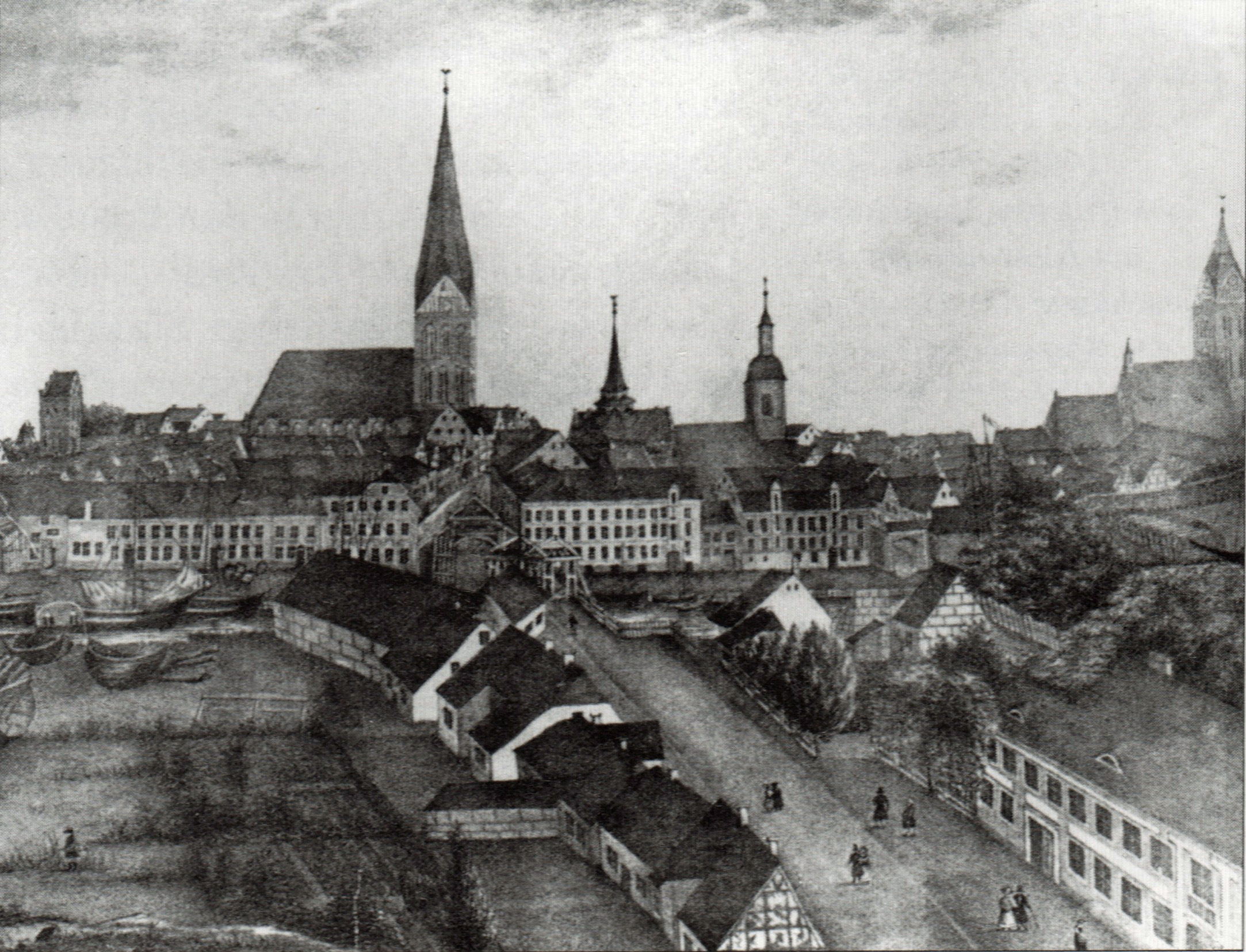 Anklam um 1800 aus Blickrichtung Norden gesehen.